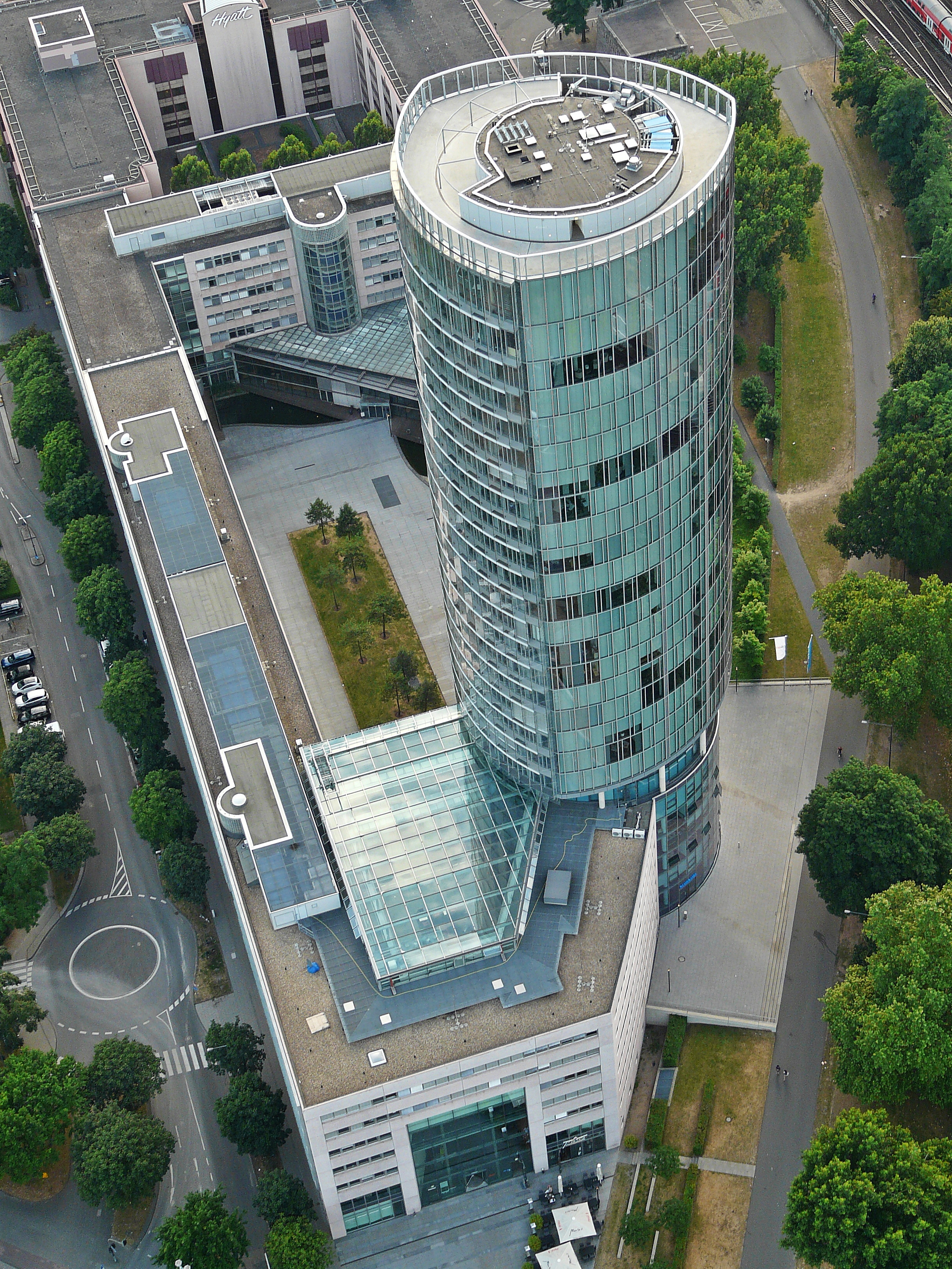 Luftaufnahme von KölnTriangle.